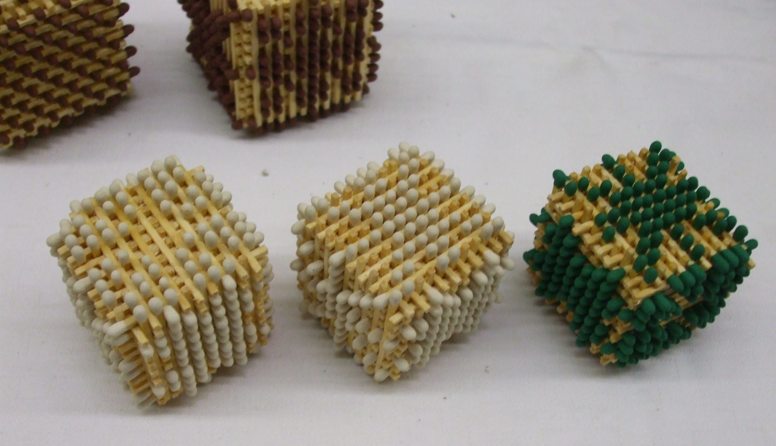 Würfel aus Streichhölzern zusammengesetzt OHNE Kleber! Zu finden unter Homepage